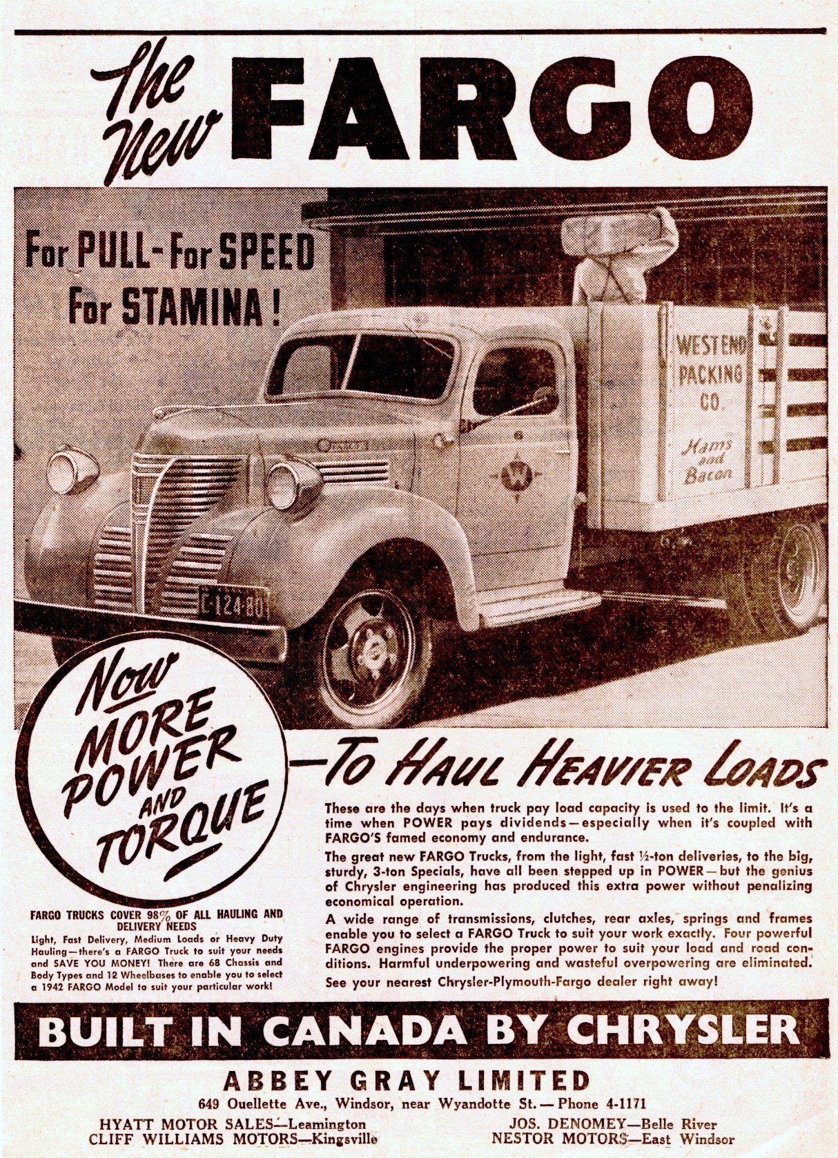 1942 Fargo Stake Truck (Canada)